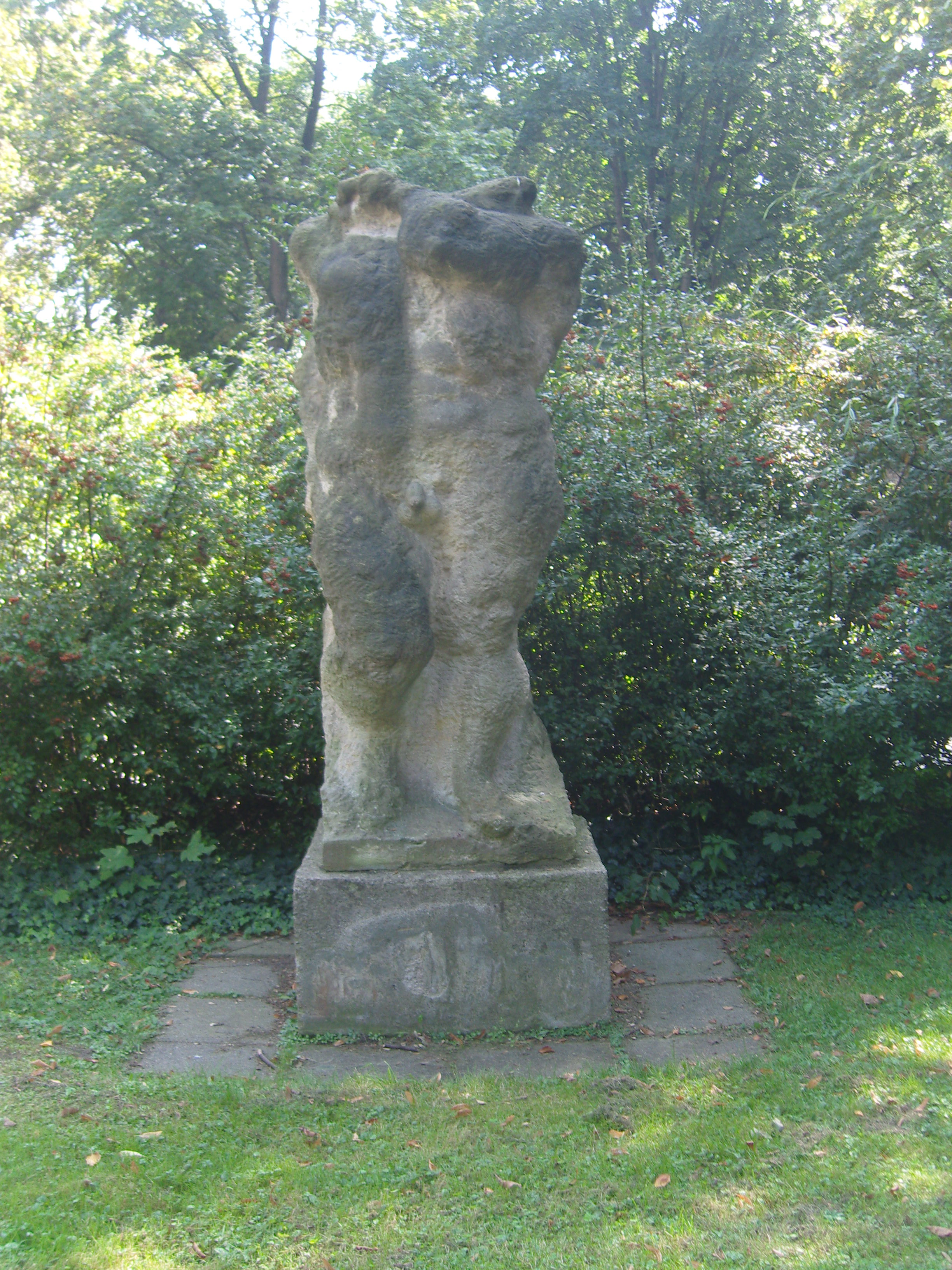 Torso geschaffen von Michael Göttsche, am Sachsenplatz in Dresden